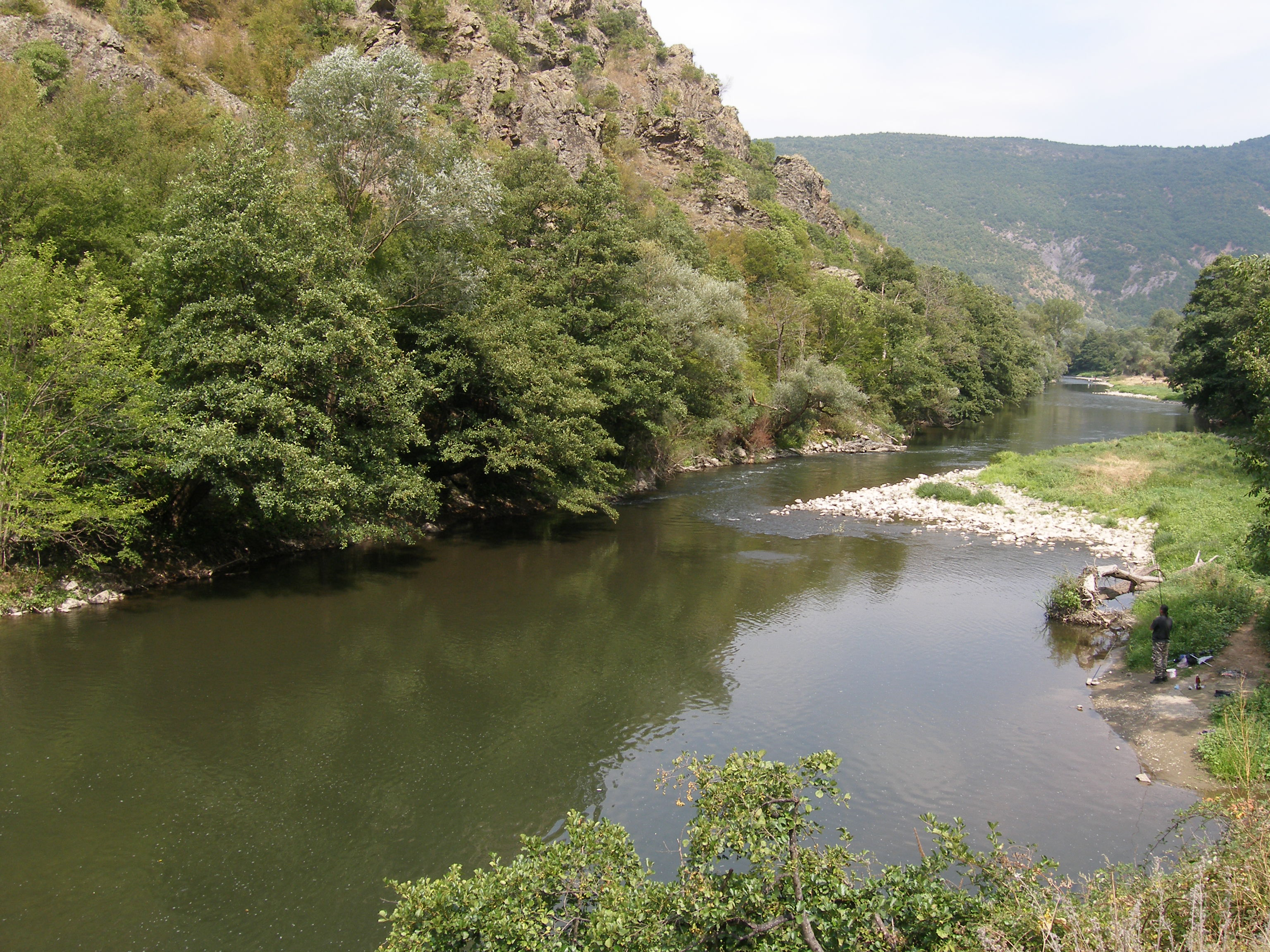 Река Струма